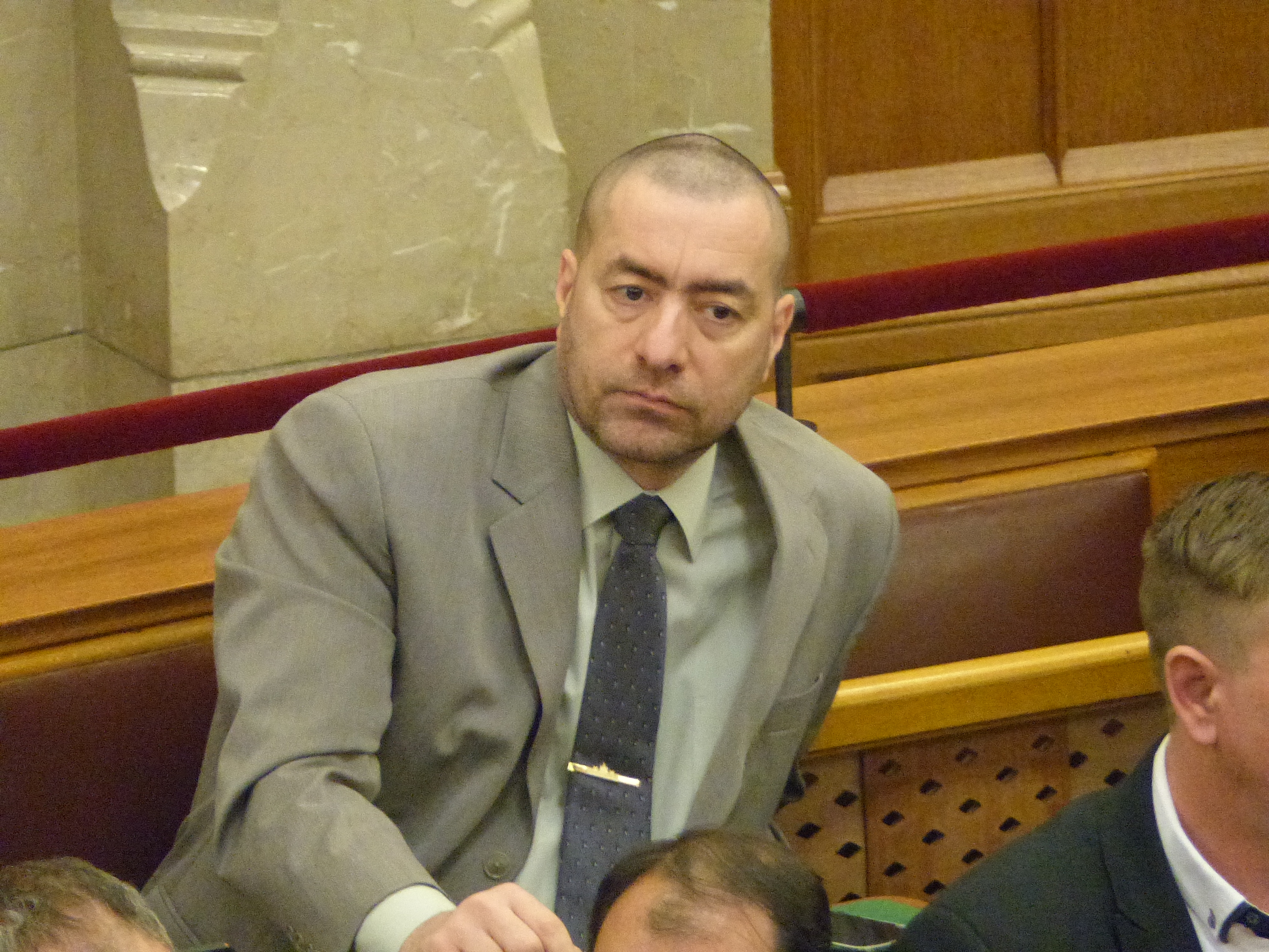 Kónya Péter országgyűlési képviselő. A felvétel 2016. november 8-án készült az Országházban. Az Országgyűlés ezen a napon szavazott az Alaptörvény 7. módosításáról.